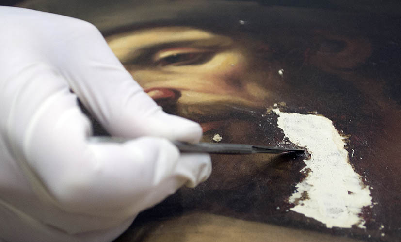 Restaurador trabajando sobre un lienzo en los talleres de la Fundación en Santa María de Valbuena.